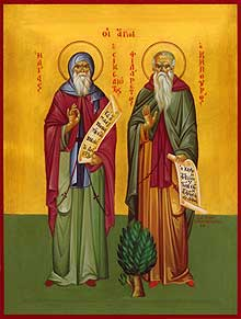 Deitsch: Die Heiligen Elia und Filarete. Sicilianu: Sant’Elia e Filaretu Icona du Monasteriu Ortodossu di Siminara( RC ), 2005.